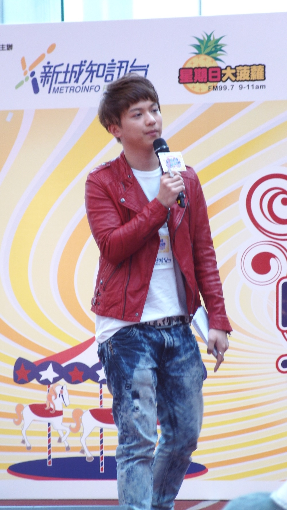 中文（香港）: DJ吳浩賢(科林)的樣子